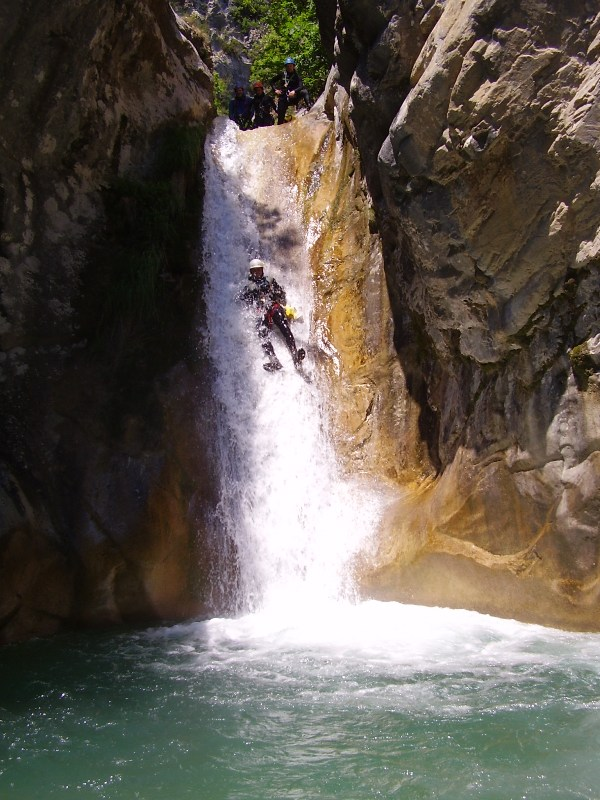 Clue de la Maglia, scivolo di 9 metri